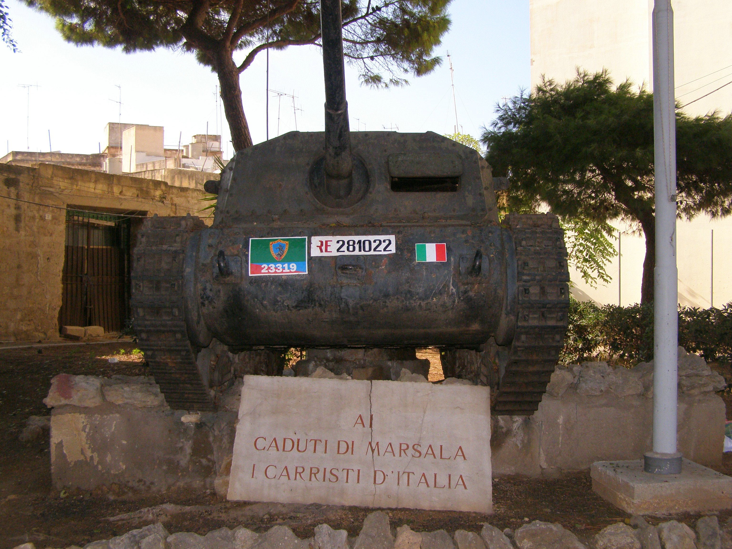 Monumento donato alla Città di Marsala dall'Associazione Nazionale Carristi Italiani in ricordo dei bombardamenti britannici dell'11 maggio 1943. Il mezzo è un Semovente 75/32 Modello 1937.